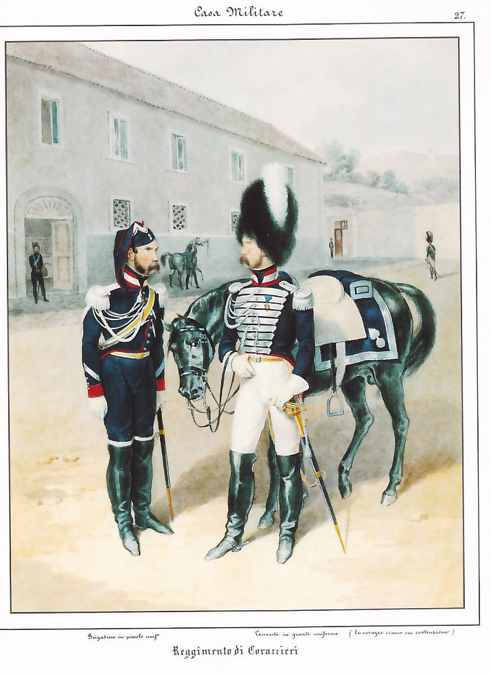 Cuirassiers de la Garde royale napolitaine au quartier. Brigadier en petite tenue (à gauche) et lieutenant en grande tenue (à droite).